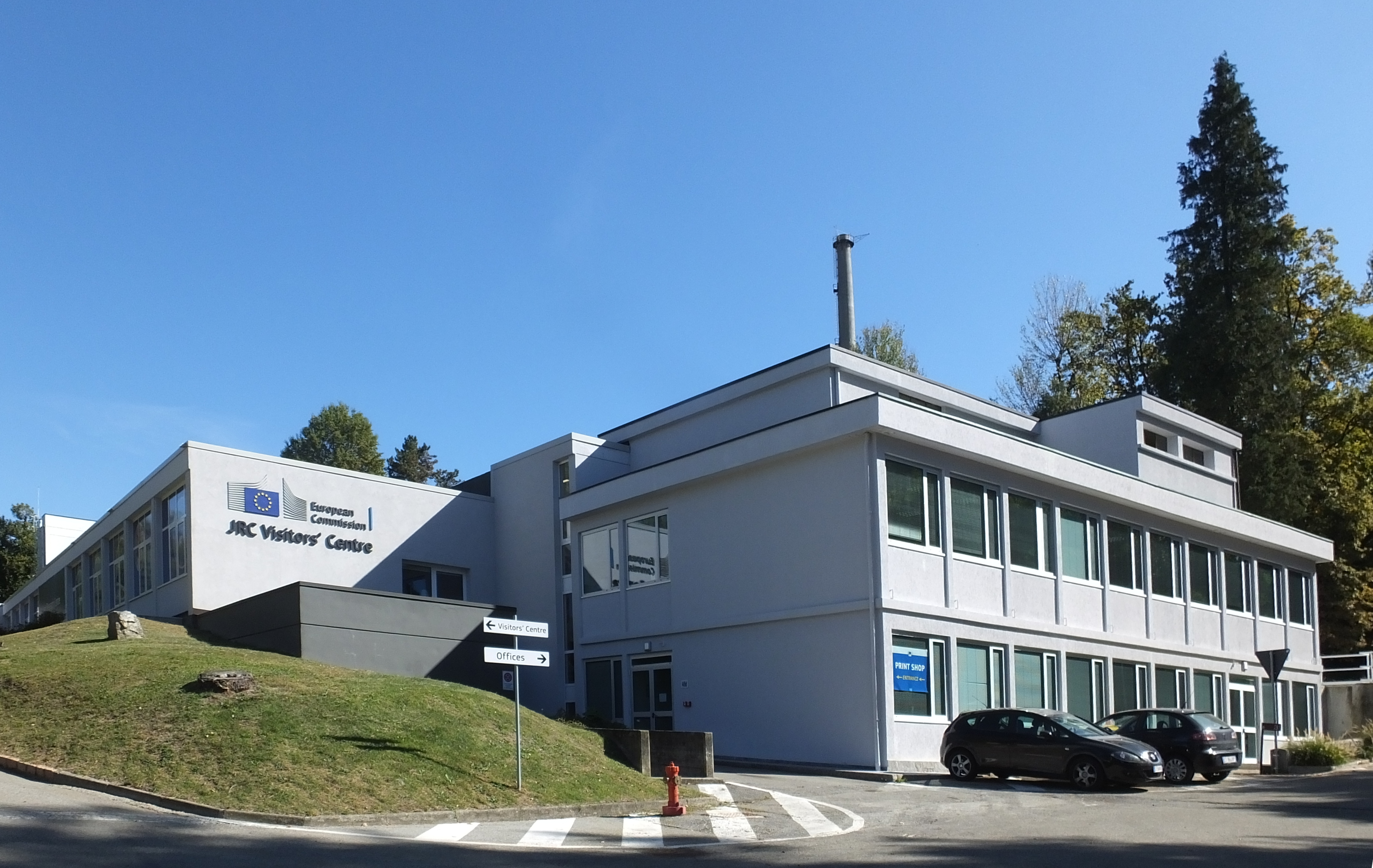 Wspólne Centrum Badawcze Unii Europejskiej w Isprze. Ośrodek dla odwiedzających przy Via Polonia.